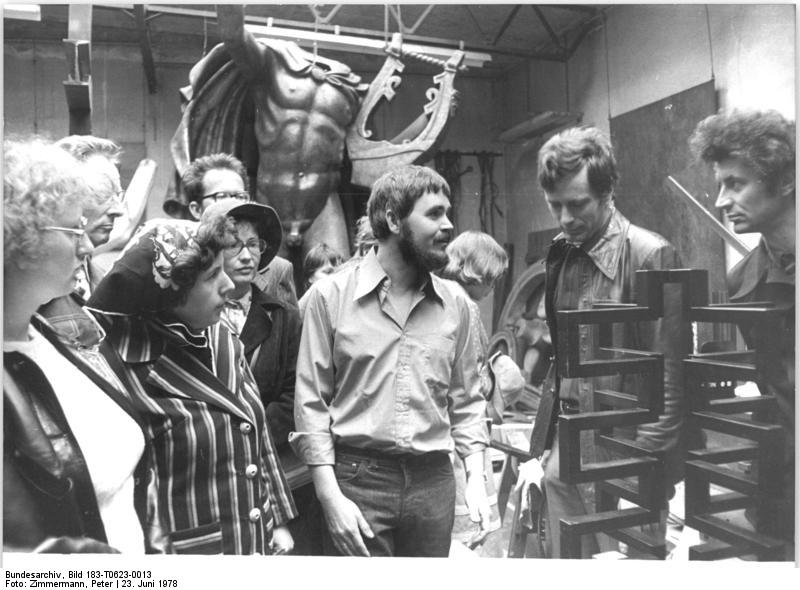 Berlin, Atelier Achim Kühn ADN-ZB Zimmermann 23.6.78-pe Berlin: Atelier und Bühne. Ideenreiche Arbeiten und Entwürfe können Besucher im Atelier für Stahl- und Metallgestaltung von Achim Kühn (3. v.r.) in Berlin-Grünau kennenlernen. Der 33jährige Künstler, Sohn des berühmten Metallgestalters Prof. Fritz Kühn, hat in der väterlichen Werkstatt die Meisterprüfung und an der Hochschule für Architektur und Bauwesen in Weimar das Diplom abgelegt. Thema seiner Diplomarbeit war "Die Umgestaltung des Platzes der Akademie" - daher ist Achim Kühn mit seinen Mitarbeitern seit 1967 mit Arbeiten für dieses umfangreiche Projekt beschäftigt. Einige seiner bekannten Arbeiten in Berlin sind die Eingangstore zur Marienkirche und die Brunnenplastik im Volkspark Friedrichshain, unter deren Wasserglocke man trocken stehen kann. Die acht Mitarbeiter der Werkstatt - darunter zwei Lehrlinge - schaffen vorwiegend moderne Werke aus Stahl, Kupfer, Messing, Aluminium, auch aus Plaste und Beton. Die Figuren für das ehemalige Schauspielhaus werden nach Gipsmodellen aus Kupferblech frei getrieben. Abgebildete Personen: Kühn, Achim: Kunstschmied, DDR (GND 132926970)